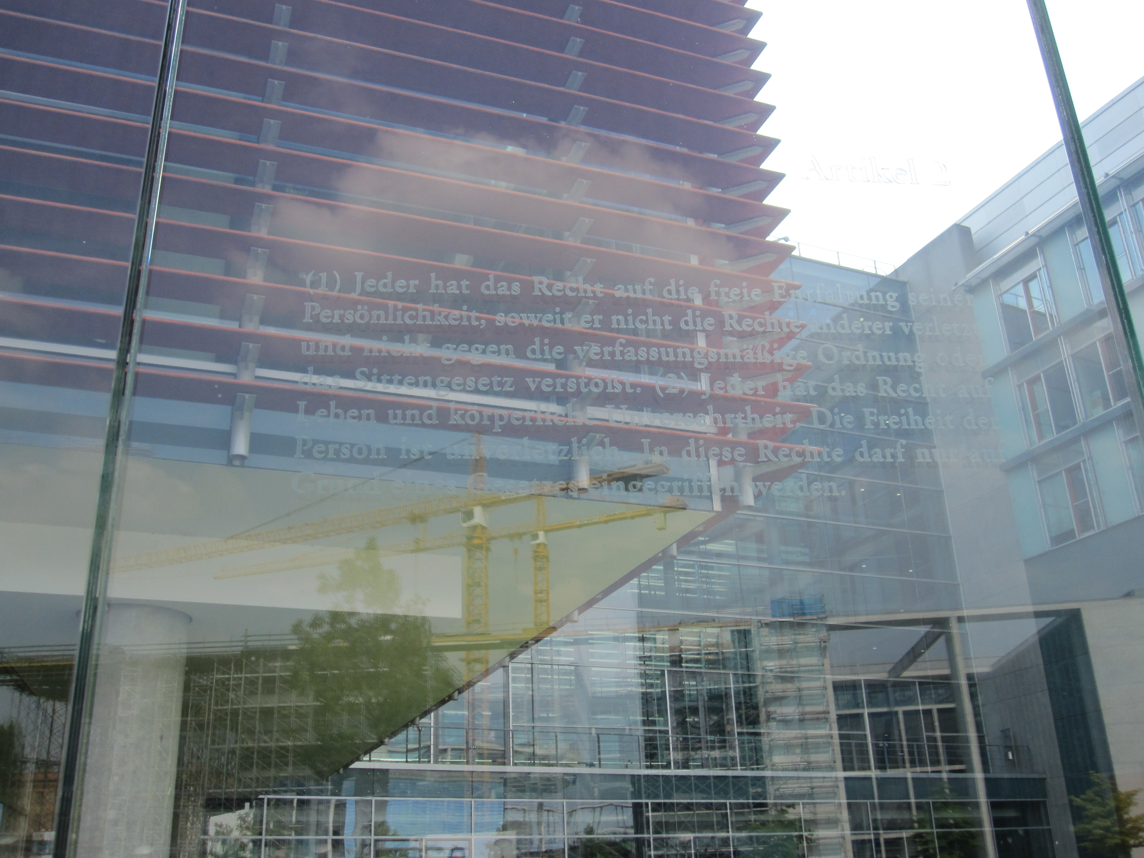 Bundestagsgebäude in Berlin: Der israelische Künstler Dani Karavan hat in drei Meter hohe Glasscheiben, die einen Außenhof des Jakob-Kaiser-Hauses im Uferbereich zur Spree begrenzen, die 19 Grundrechtsartikel des Grundgesetzes mit Laser eingraviert. „Die Grundrechtsartikel schweben gleichsam in Augenhöhe vor dem Haus der Fraktionen, dem Jakob-Kaiser-Haus“ (Andreas Kaernbach, Deutscher Bundestag).